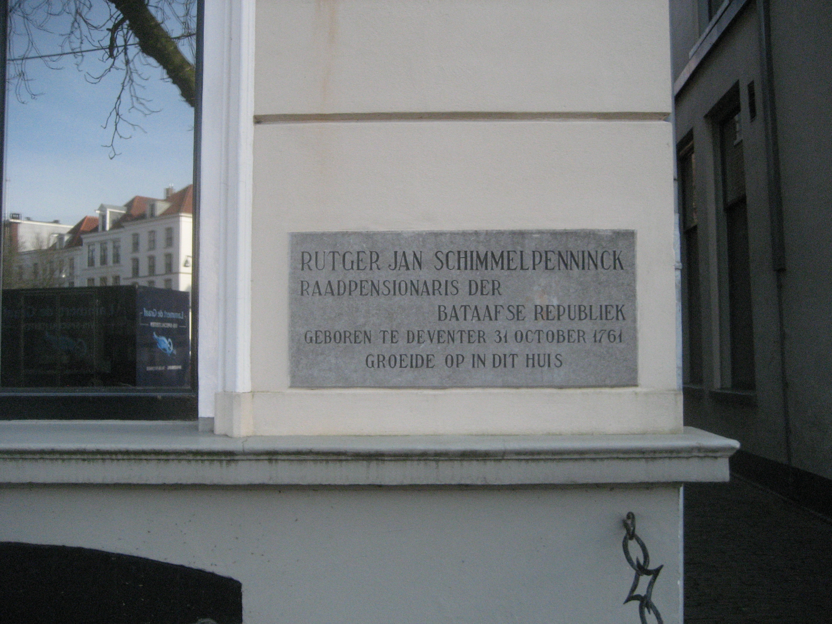 Herinneringsteen. "Rutger Jan Schimmelpenninck, raadspensionaris der Bataafse Republiek. Geboren te Deventer 31 october 1761. Groeide op in dit huis" Brink 23, Deventer